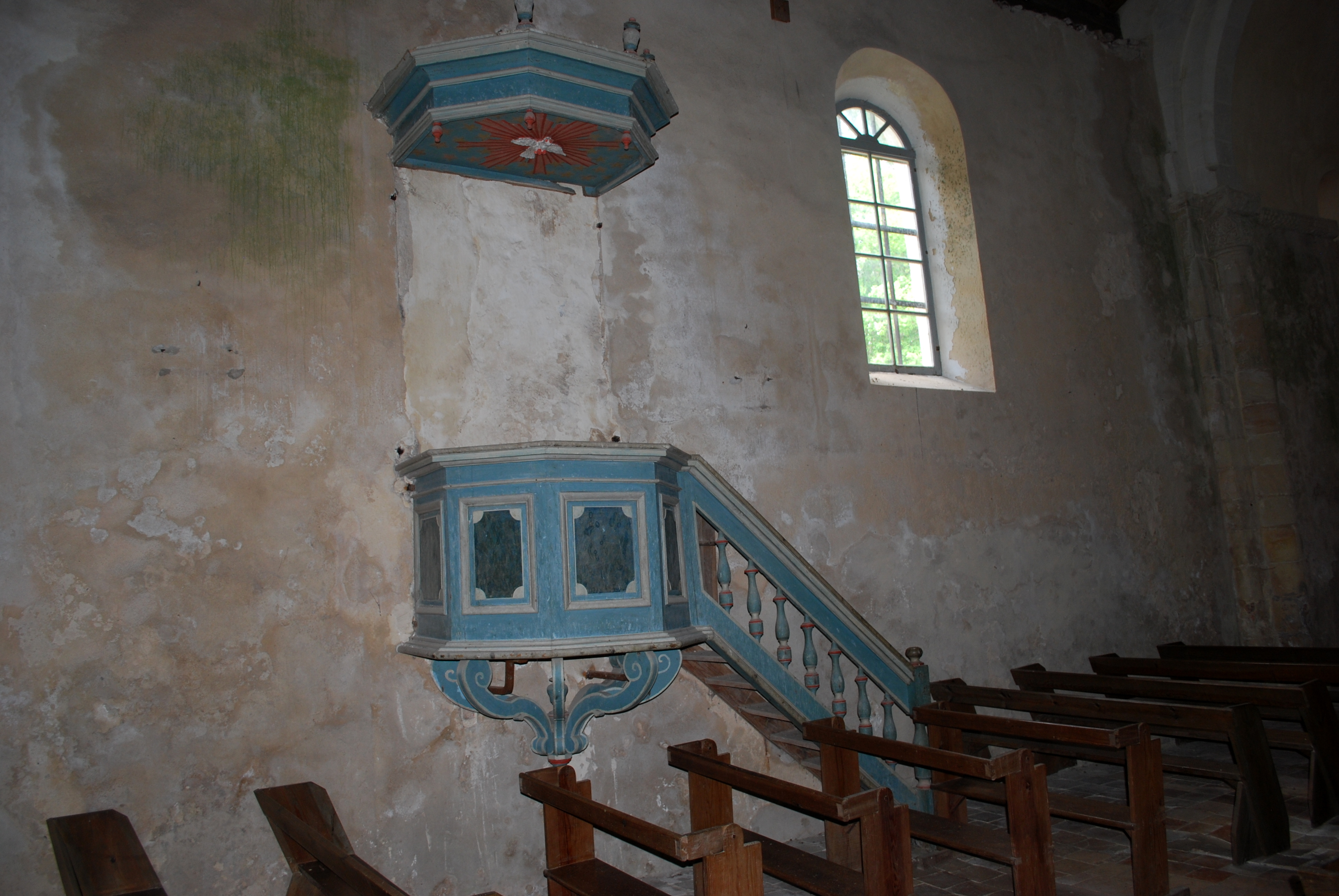 Belin-Béliet église St Pierre de Mons